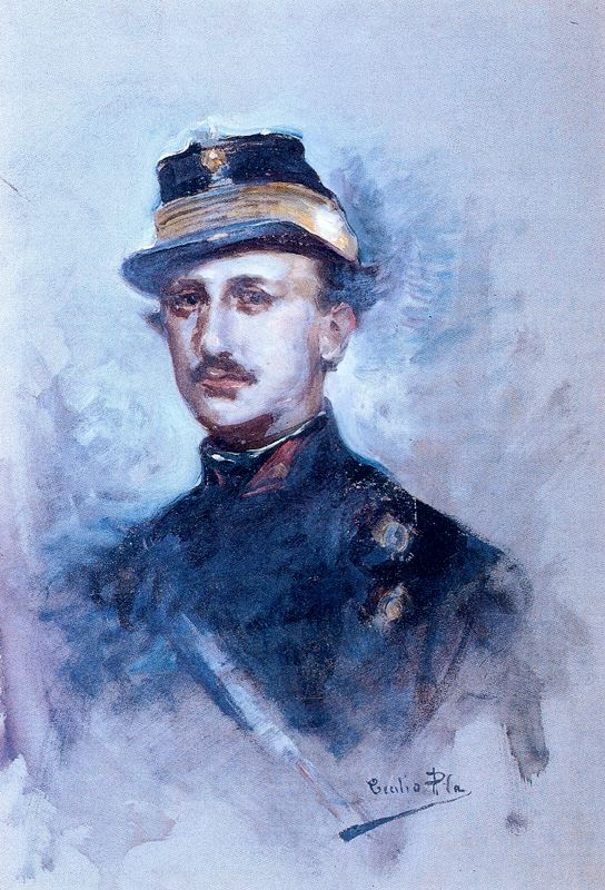 El rey Francisco II de Nápoles, retrato de Cecilio Plá y Gallardo (técnica mixta sobre papel. 32 x 20 cm. Colección del Marqués de Torrelaguna, Marques de Mendigorria, Madrid)